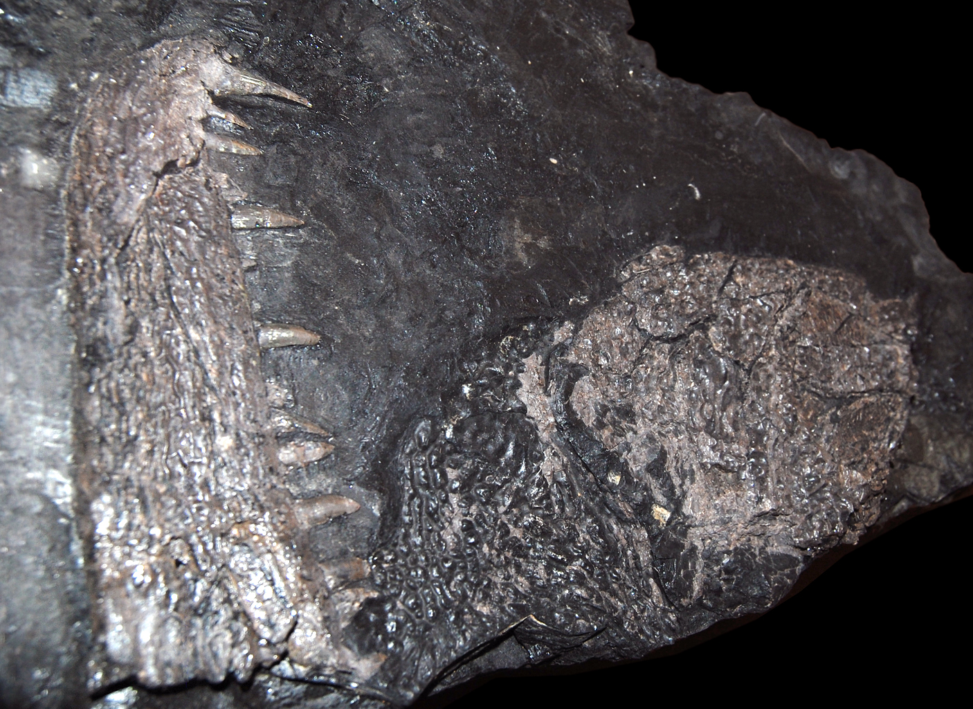 Naturhistorisches Museum Wien